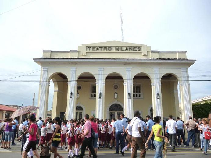 Teatro José Jacinto Milanés en Pinar del Río, Cuba